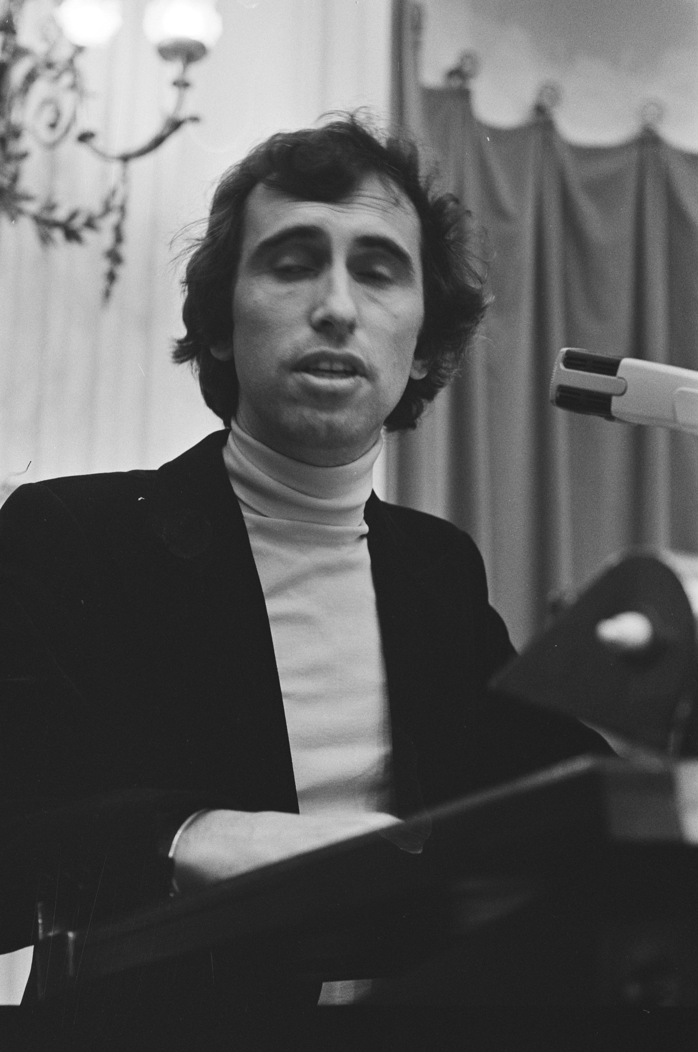 Collectie / Archief : Fotocollectie Anefo Reportage / Serie : [ onbekend ] Beschrijving : Tweede Kamer installatie Jac. Huissen (ex-CHU); 17, 18: Jac. Huissen , kop; 19, 20: neemt plaats in fractiebank Datum : 30 maart 1976 Trefwoorden : politiek Persoonsnaam : Jac. Huissen Instellingsnaam : Tweede Kamer Fotograaf : Verhoeff, Bert / Anefo Auteursrechthebbende : Nationaal Archief Materiaalsoort : Negatief (zwart/wit) Nummer archiefinventaris : bekijk toegang 2.24.01.05 Bestanddeelnummer : 928-4934